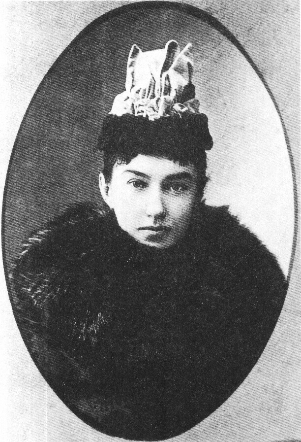 Russian novelist Lidia Veselitskaya